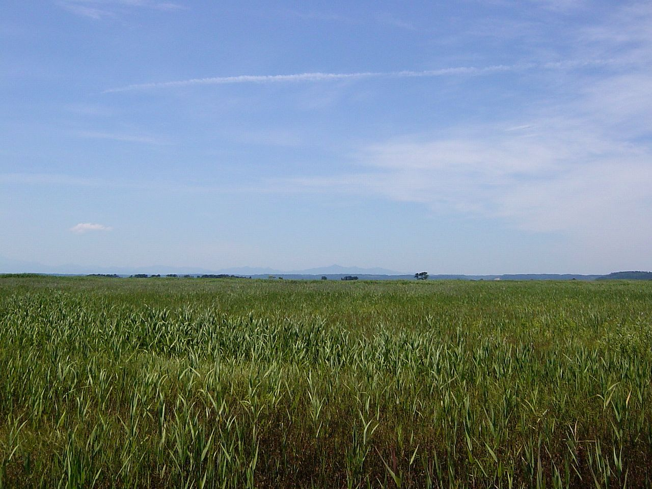 ラムサール条約 仏沼の風景